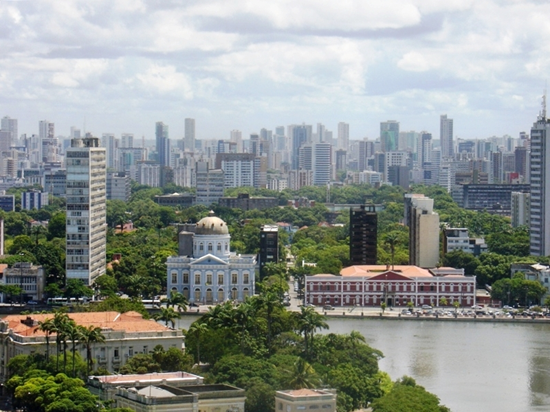 Recife, Brasil, 2011.